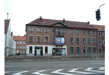 De voormalige woning van A.J. Witteryck langs de Hoefijzerlaan (vroeger: Nieuwe Wandeling of Nouvelle Promenade) te Brugge. Toestand in 2004.